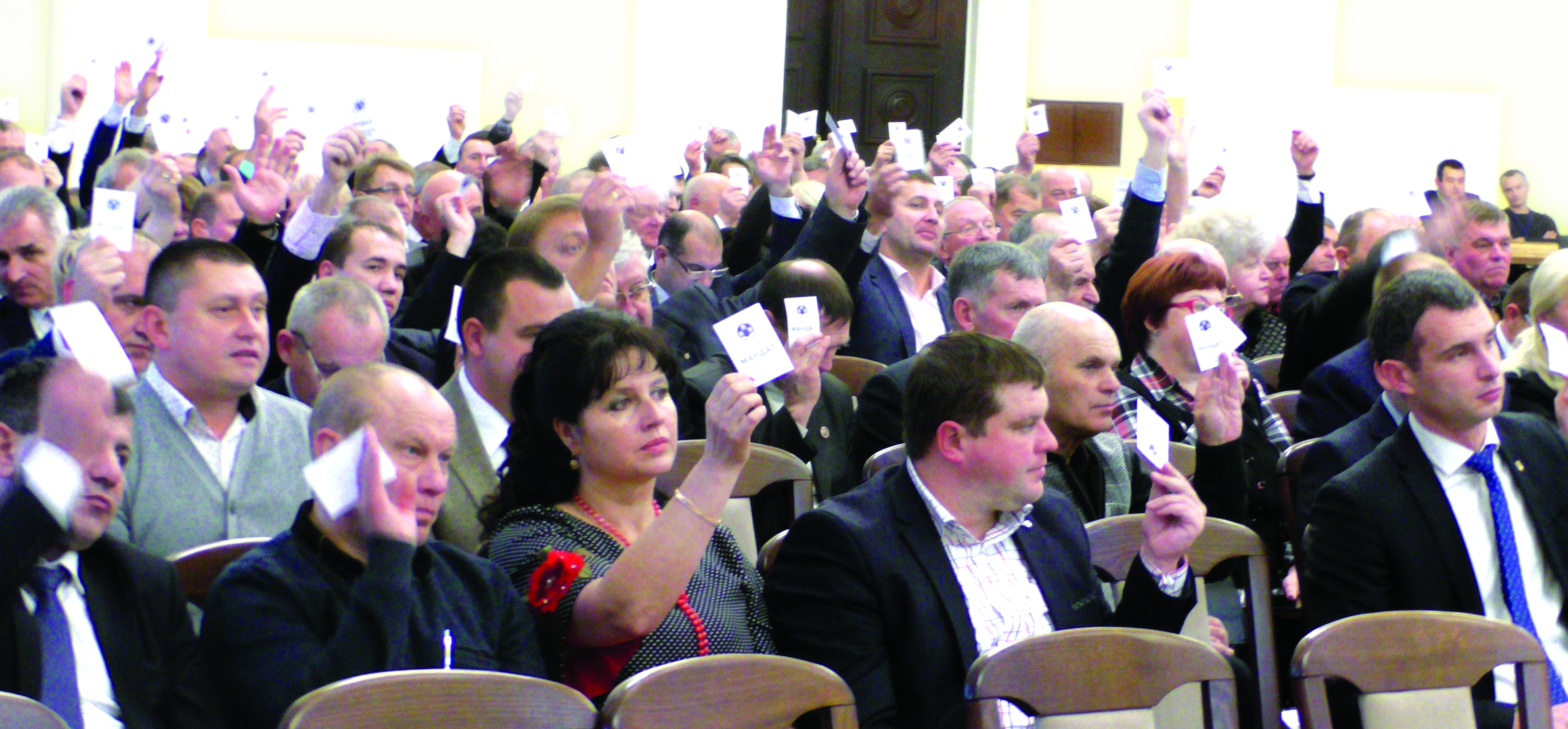 Асоціація міст України. Конференція 10.12.2018